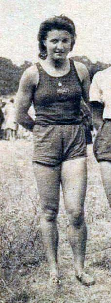 Monique Drilhon en juillet 1943 à Reims